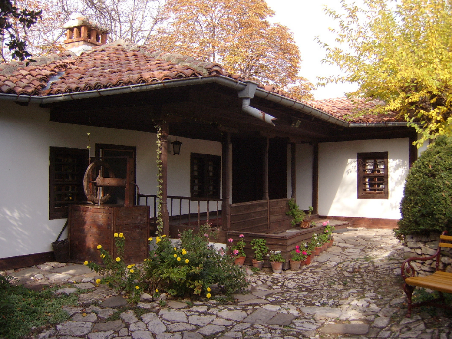 къща на яворов